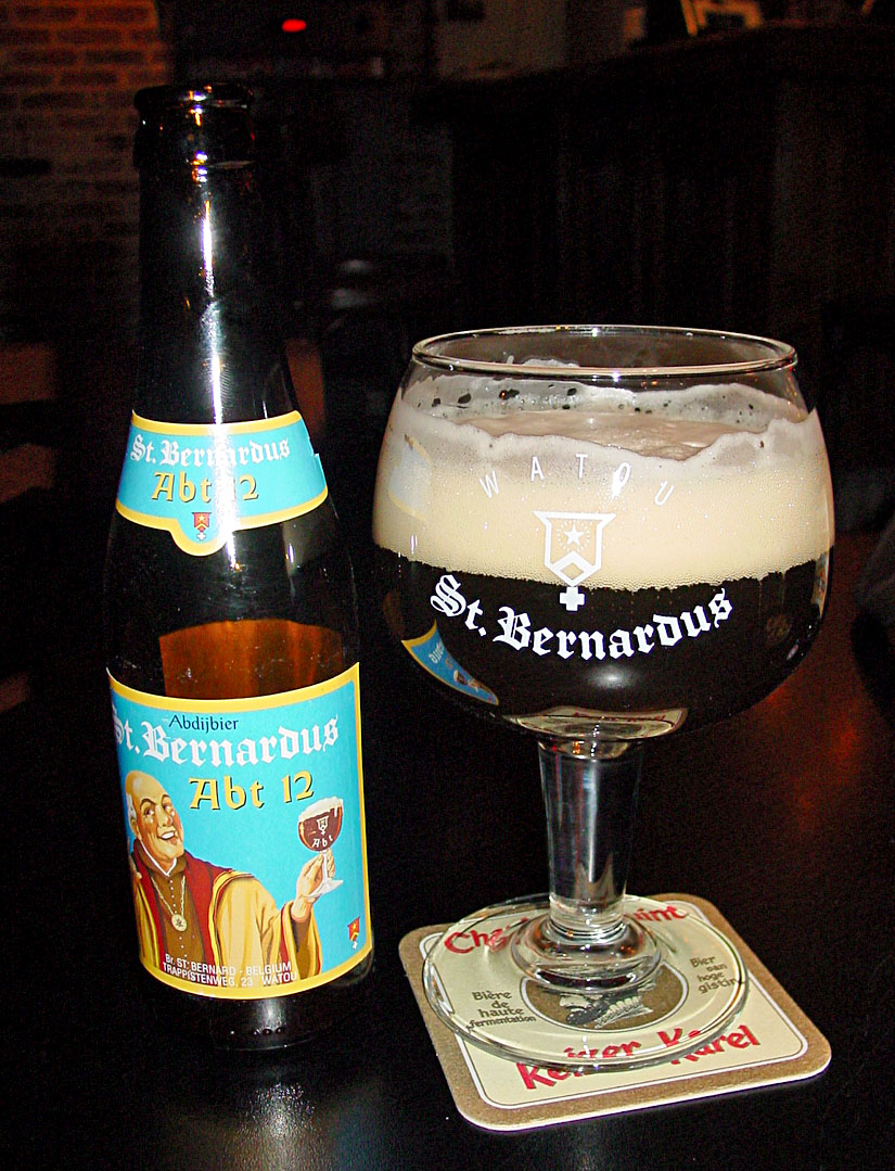 Sint-Bernardus Abt 12